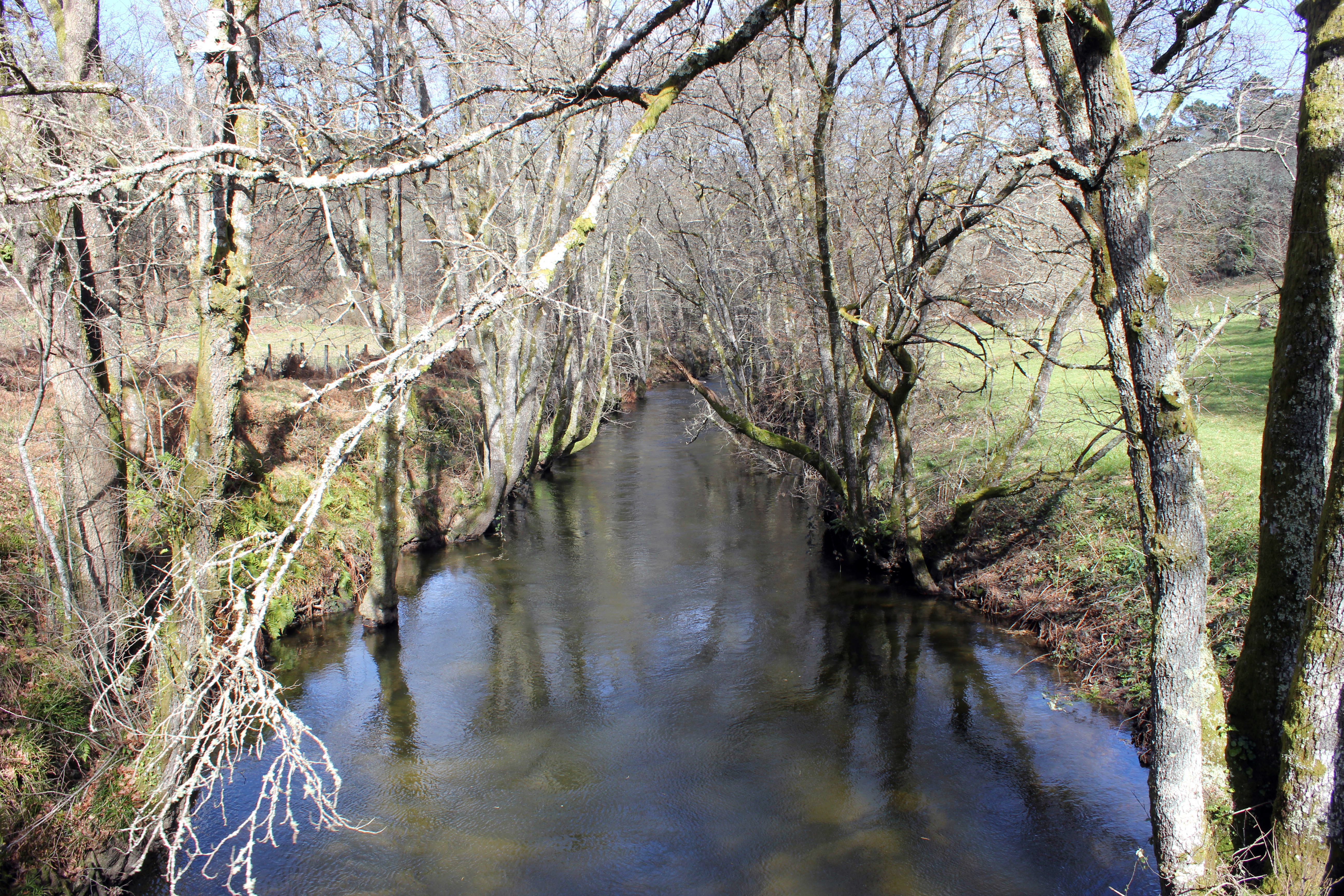 O río Barbantiño ao seu paso pola parroquia de Cornoces, no concello da Amoeiro.